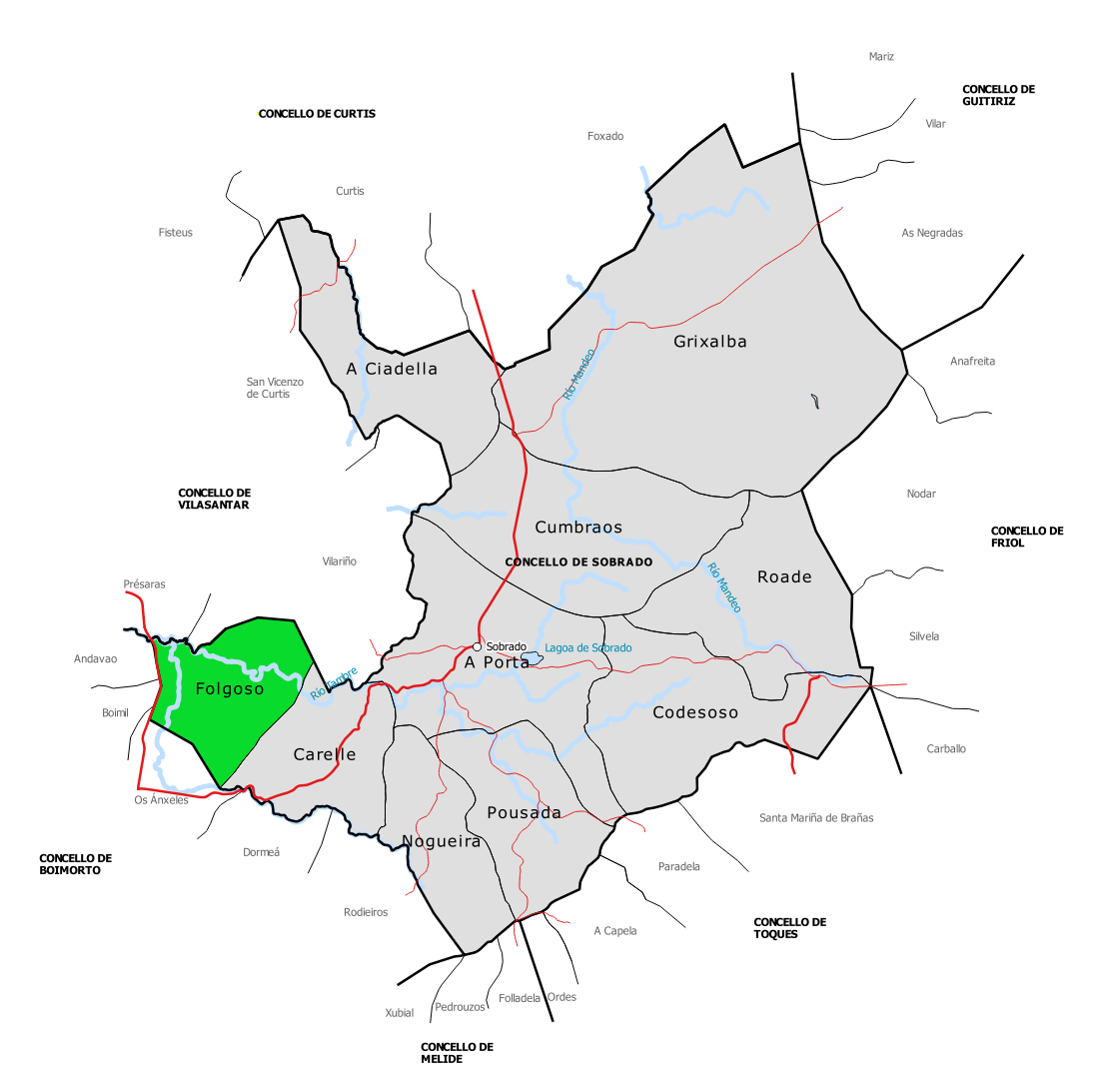 Mapa da parroquia de Folgoso no concello de Sobrado (Galiza).